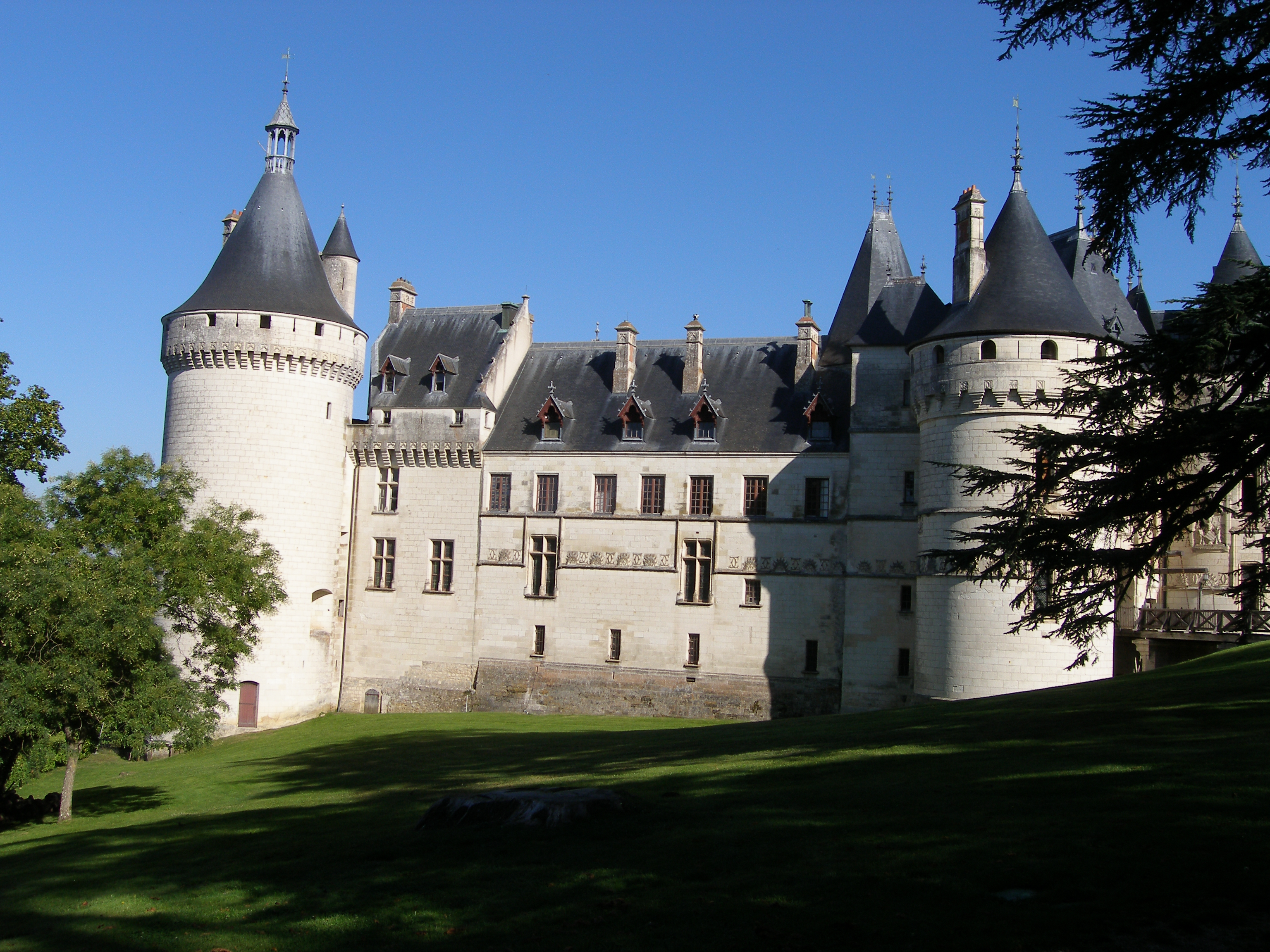 Château style Renaissance ayant appartenu à la famille d'Amboise. .